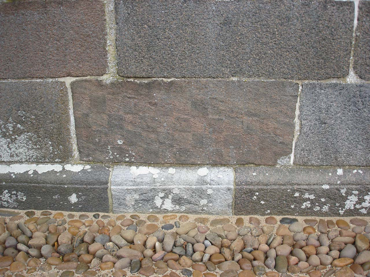 Spentrup Kirke, nærbillede af skakbrætsten